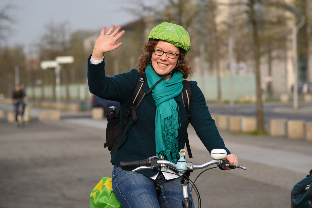 Julia Verlinden beim Fahrradforum Hochschalten statt Ausbremsen